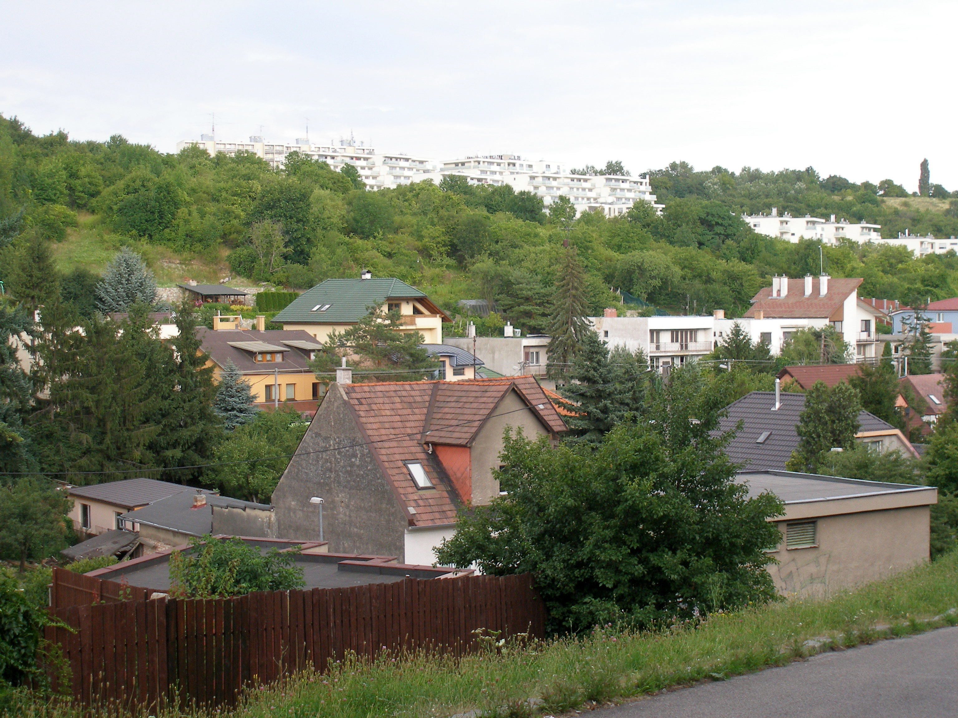 Bratislava, ulica Líščie údolie.